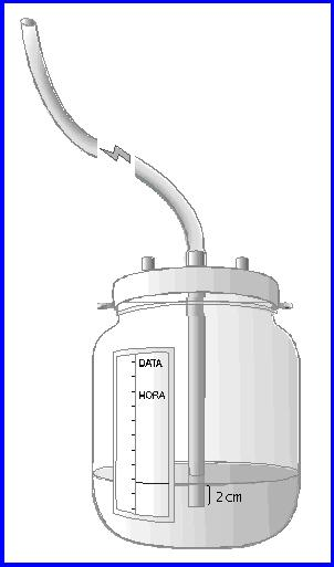 Rever se a extremidade do tubo no interior do frasco ficou submersa cerca de 1 a 2 cm abaixo do nÃ­vel lÃ­quido mÃ­nimo obrigatÃ³rio. Marcar na etiqueta do frasco coletor o nÃ­vel lÃ­quido, a data e a hora da instalaÃ§Ã£o do frasco coletor. Verificar se existe oscilaÃ§Ã£o ou borbulhamento no nÃ­vel lÃ­quido.